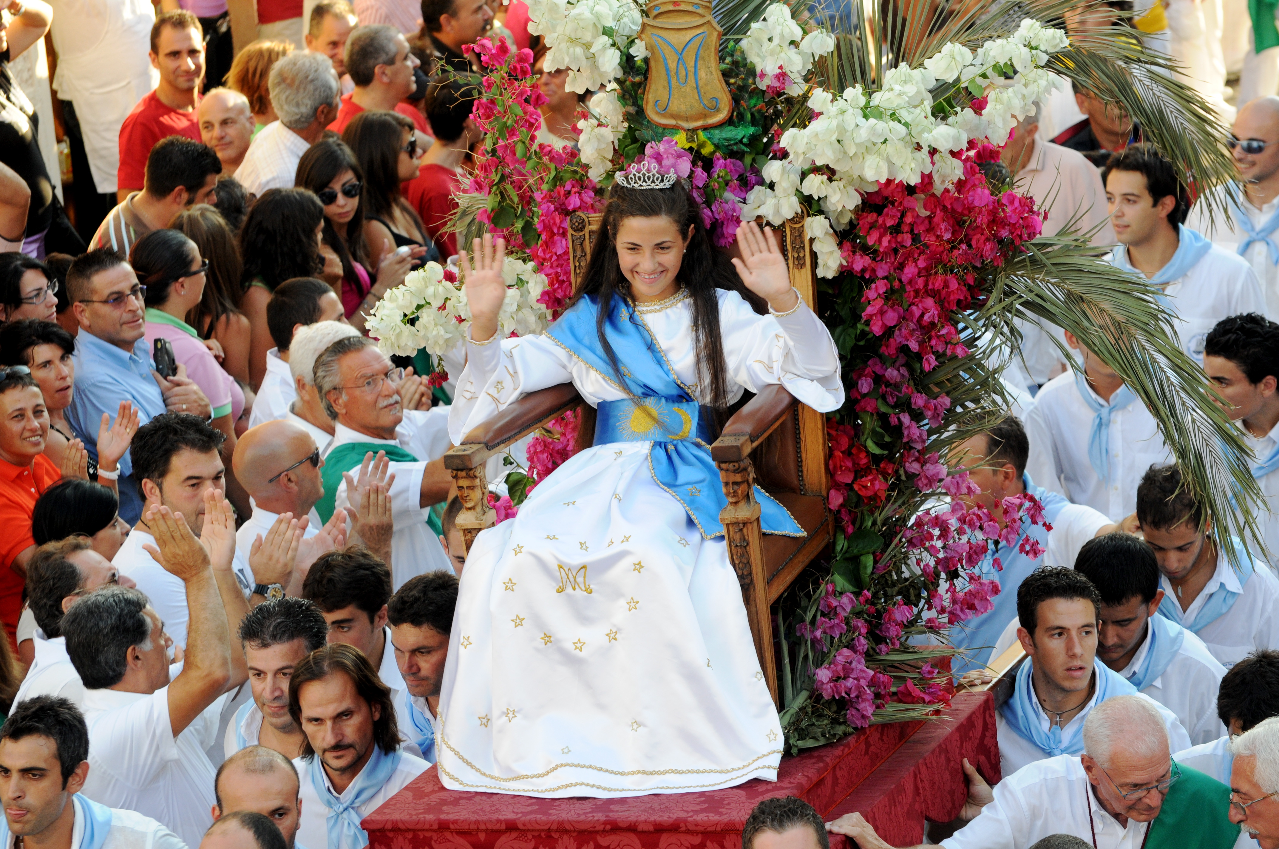 Animella sulla Portantina - Varia di Palmi 2008